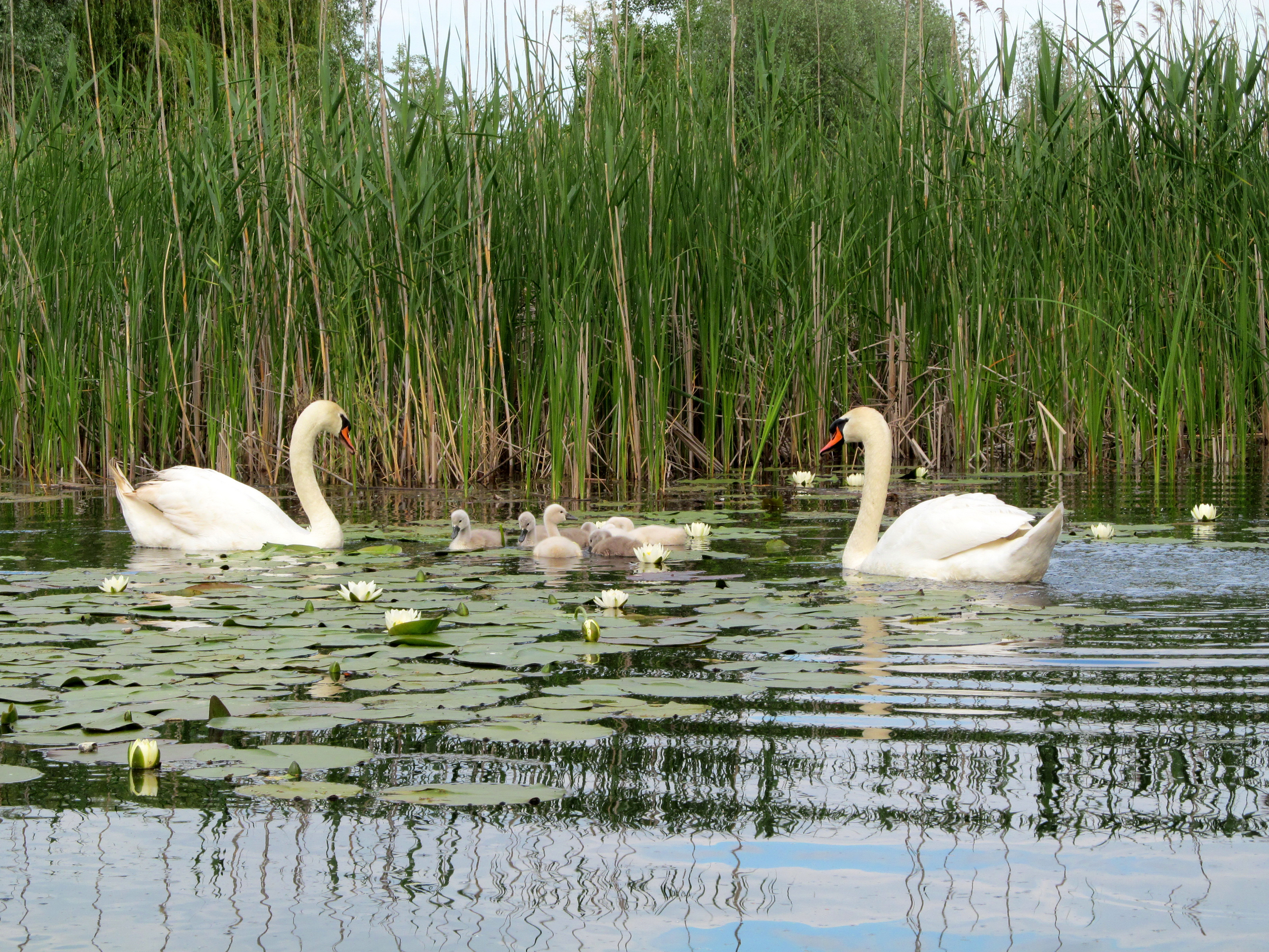 Porodica labudova grbaca